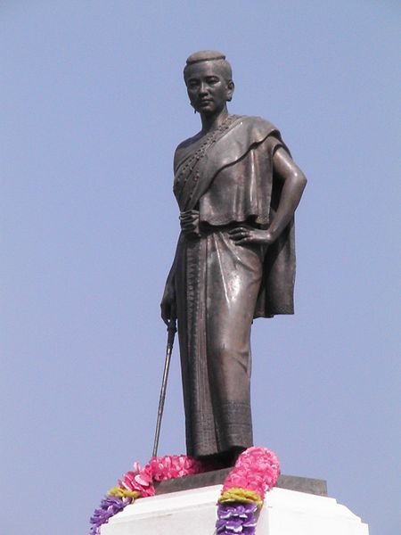 อนุสาวรีย์ท้าวสุรนารี== สัญญาอนุญาต ==